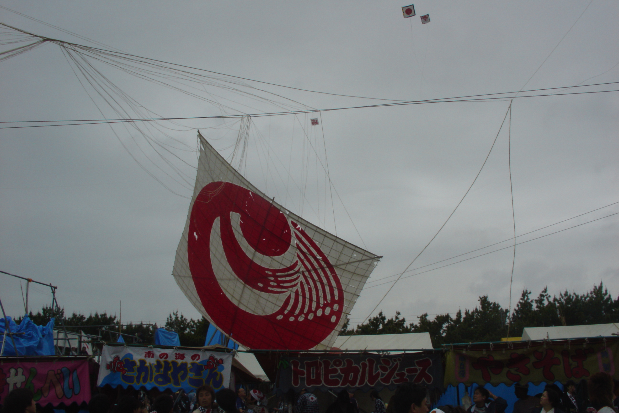 中文（香港）: 濱松祭的大風箏